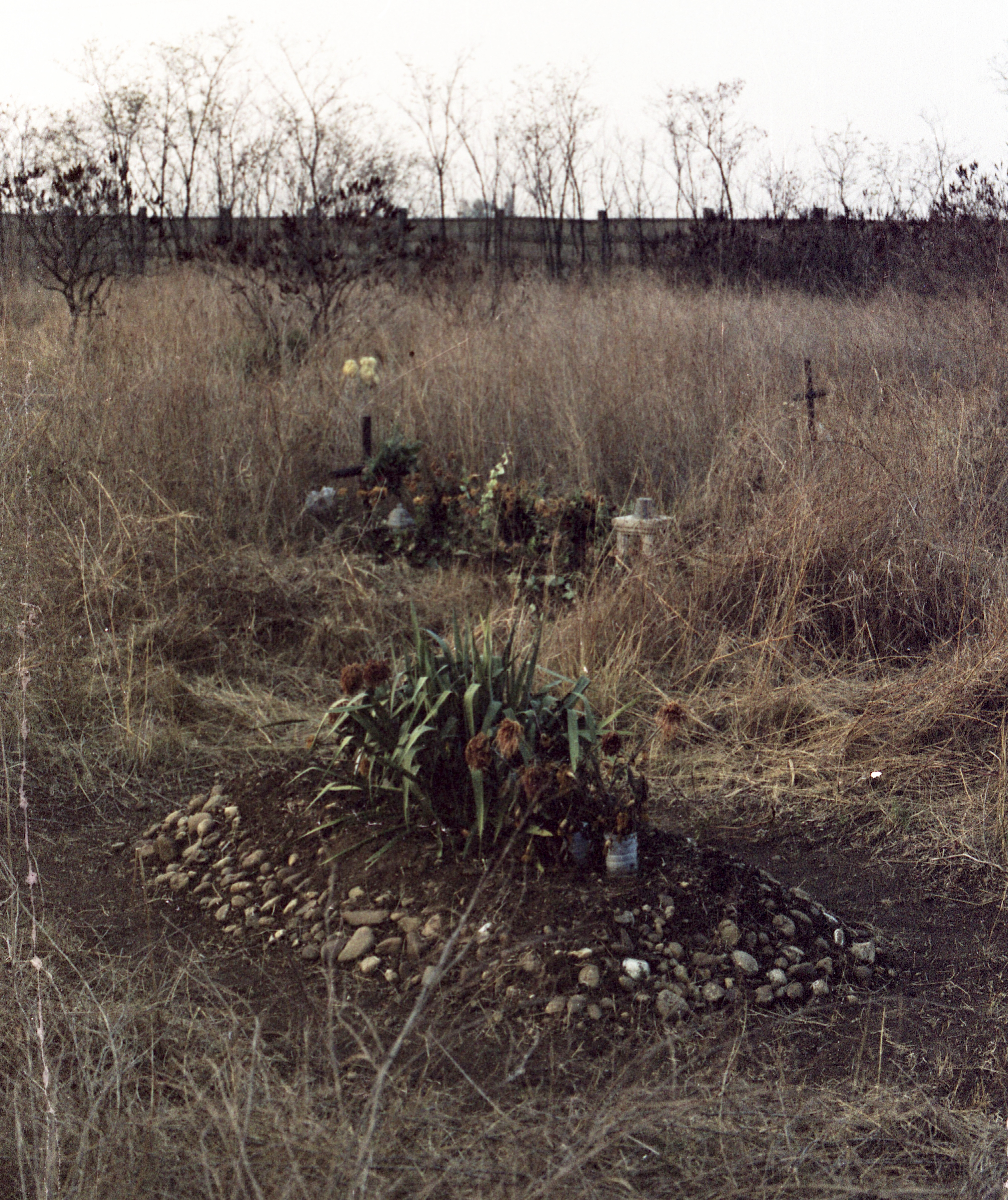 Új Köztemető, 301-es parcella. Location: Hungary, Budapest X. Tags: colorful, Budapest, cemetery Title: Új Köztemető, 301-es parcella.